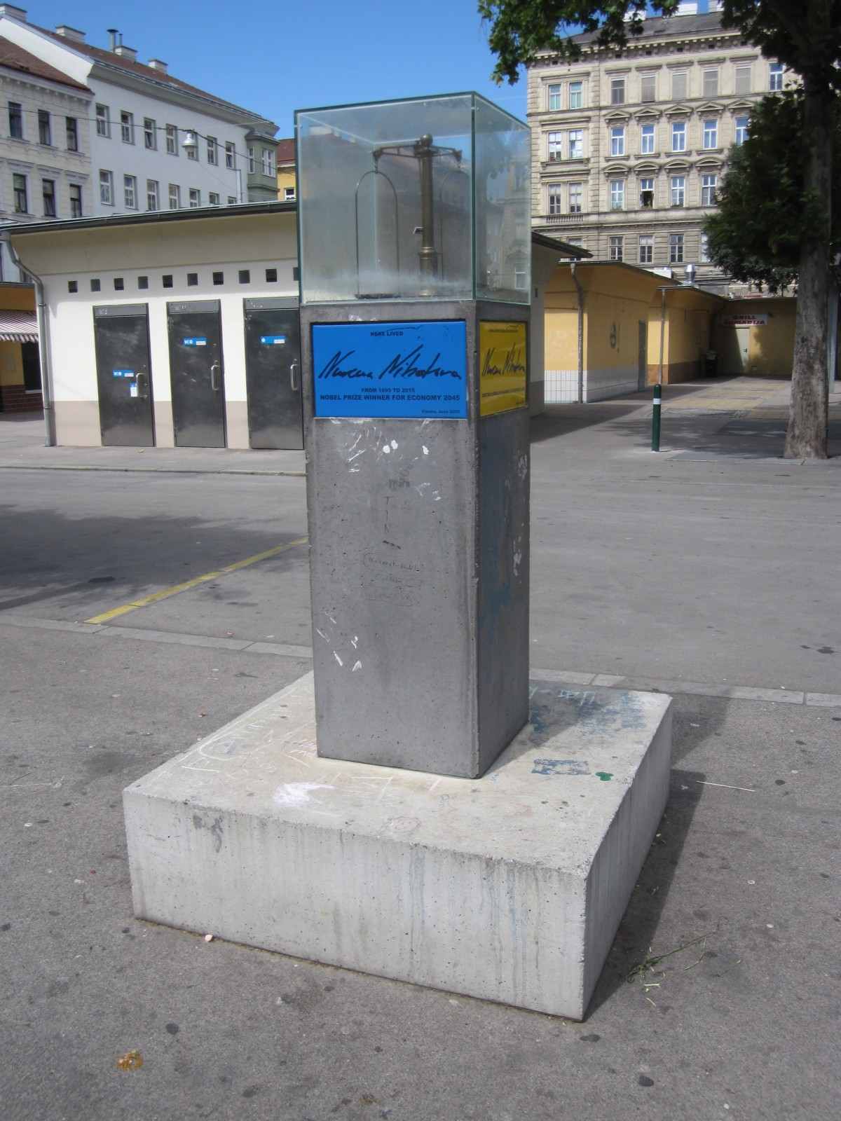 Denkmal für eine Wirtschaftsnobelpreis-Trägerin 2045 von Helmut und Johanna Kandl, Volkertplatz, Wien Leopoldstadt.